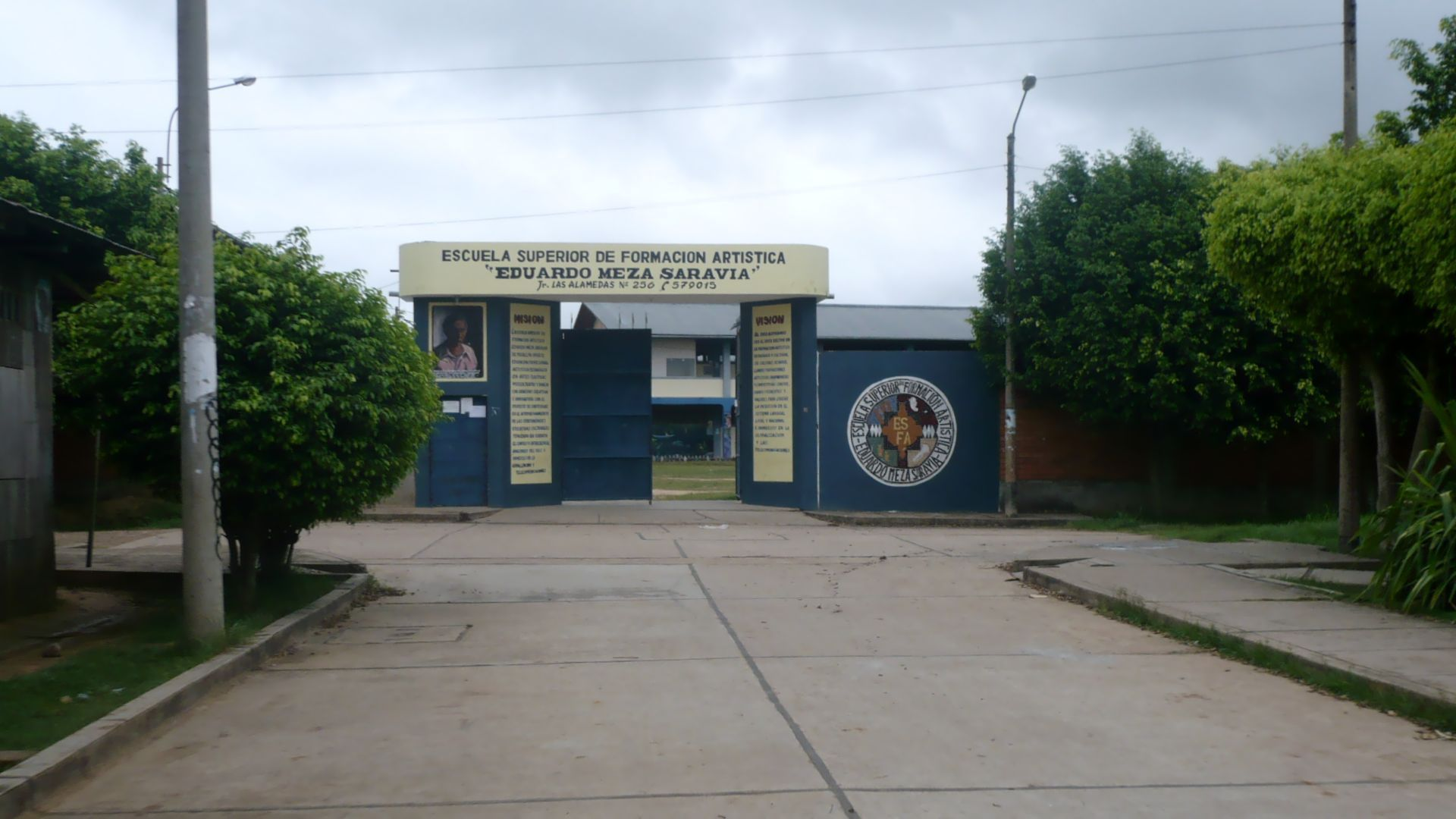 Vista de la institución de escuela superior de educación artística Eduardo Meza Saravia.